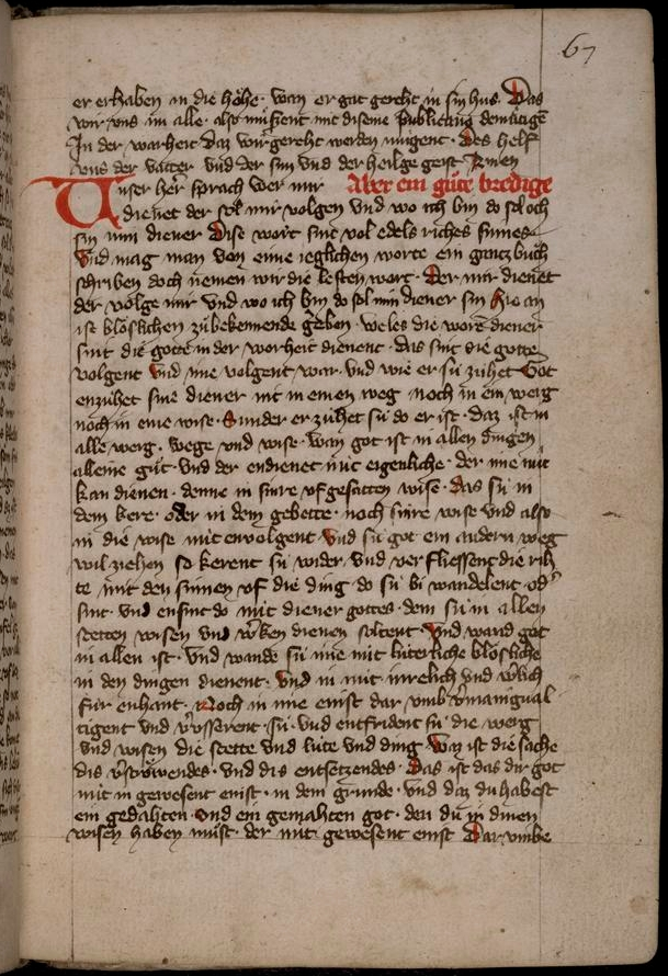 Handschrift der Predigt 77 von Johannes Tauler, Cod. Pal. germ. 105, 67r (UB Heidelberg), Elsass 1. Viertel 15. Jh.